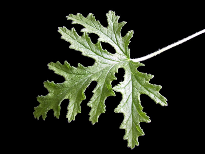 Pelargonium 'Graveolens'